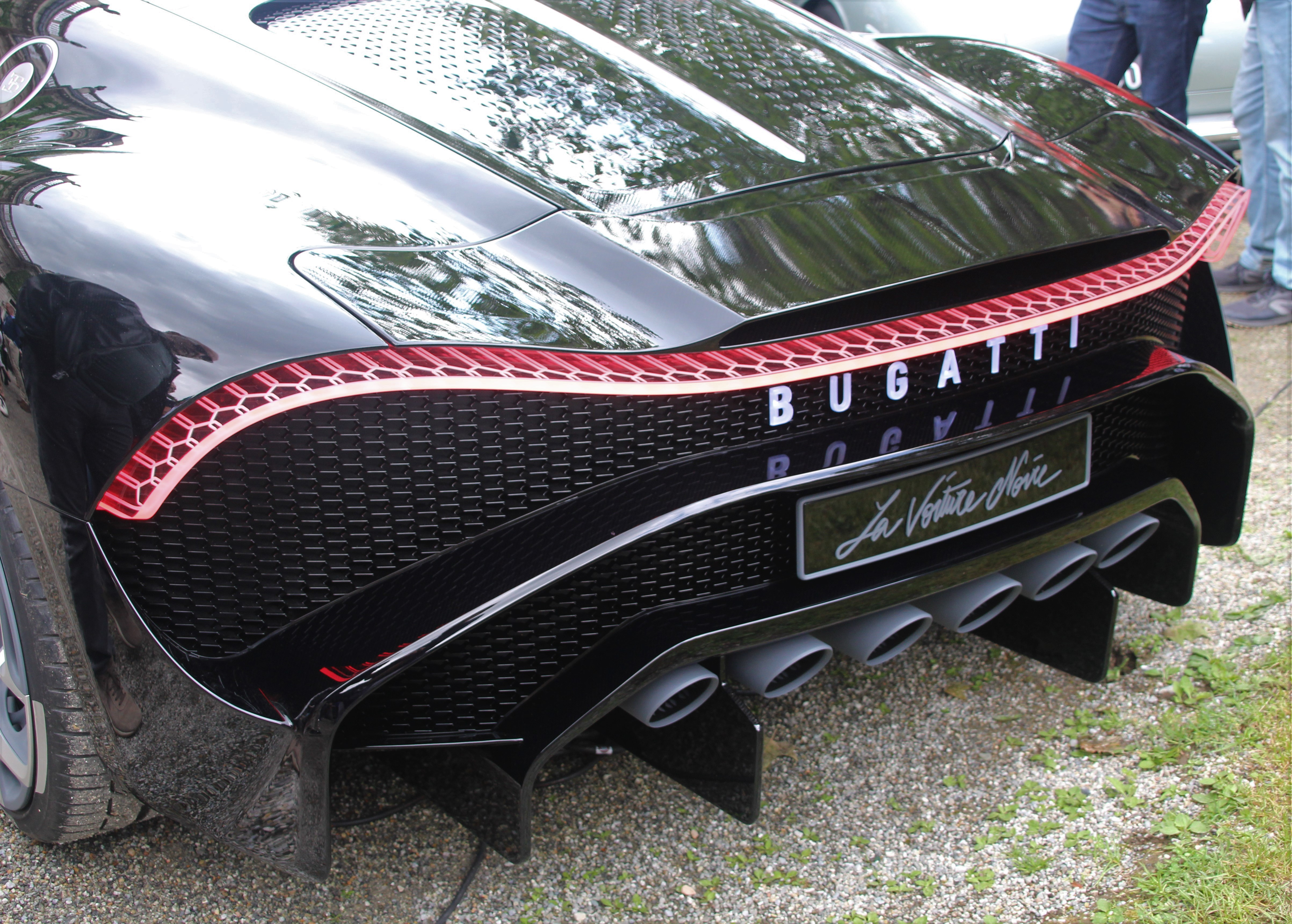 Bugatti La Voiture Noire 2019, rear